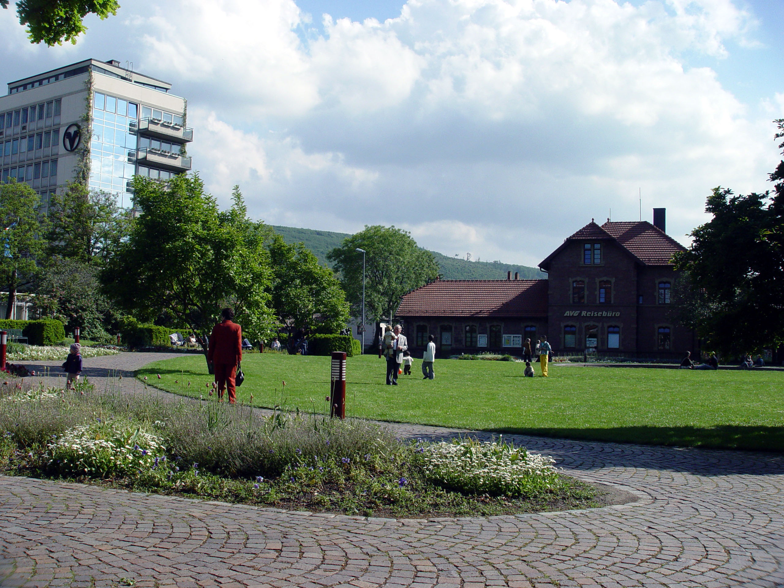 Fotografiert von Martin Dürrschnabel. Der Ettlinger Stadtgarten.